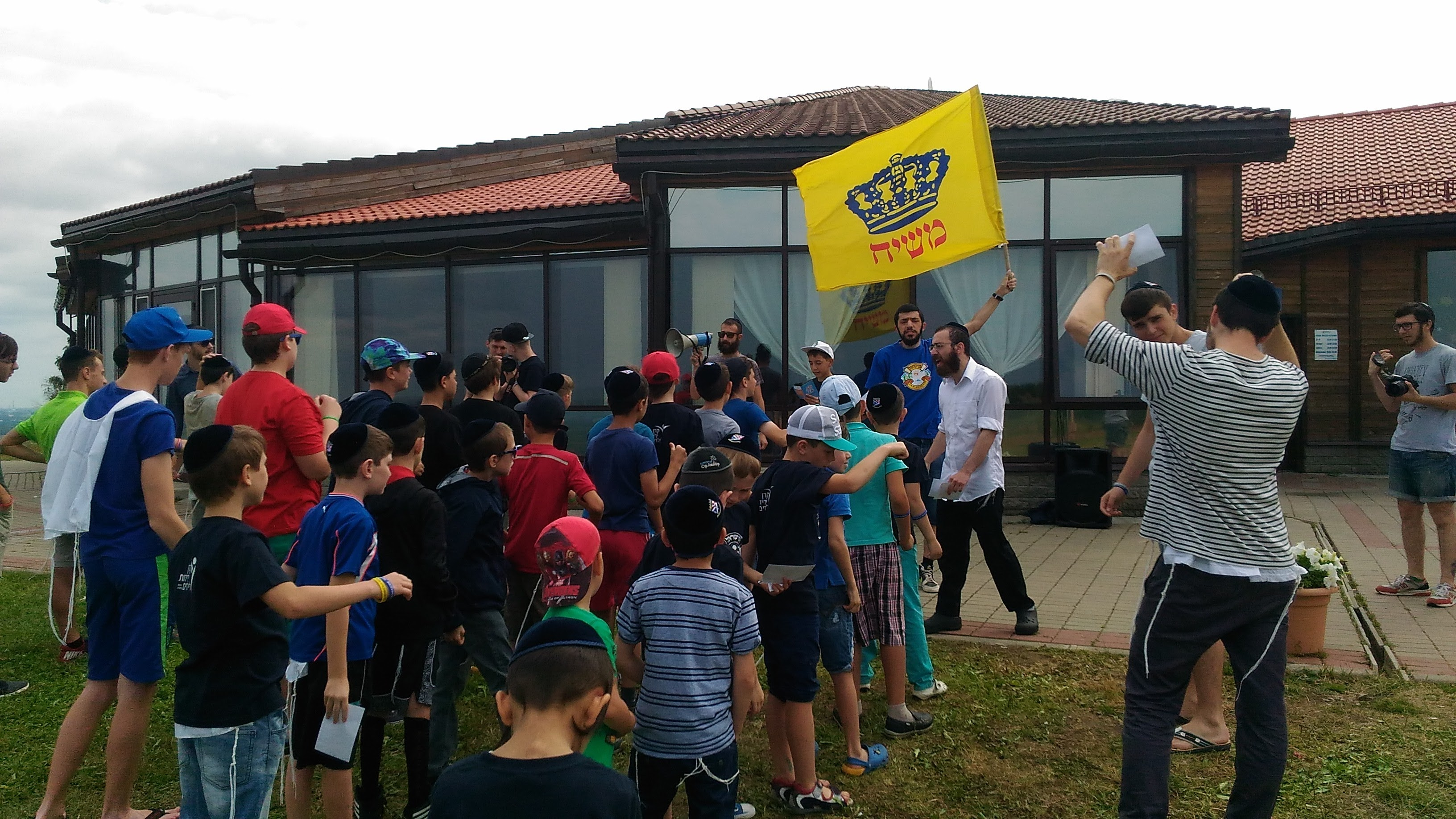 Летний детский лагерь «Ган Исроэль»